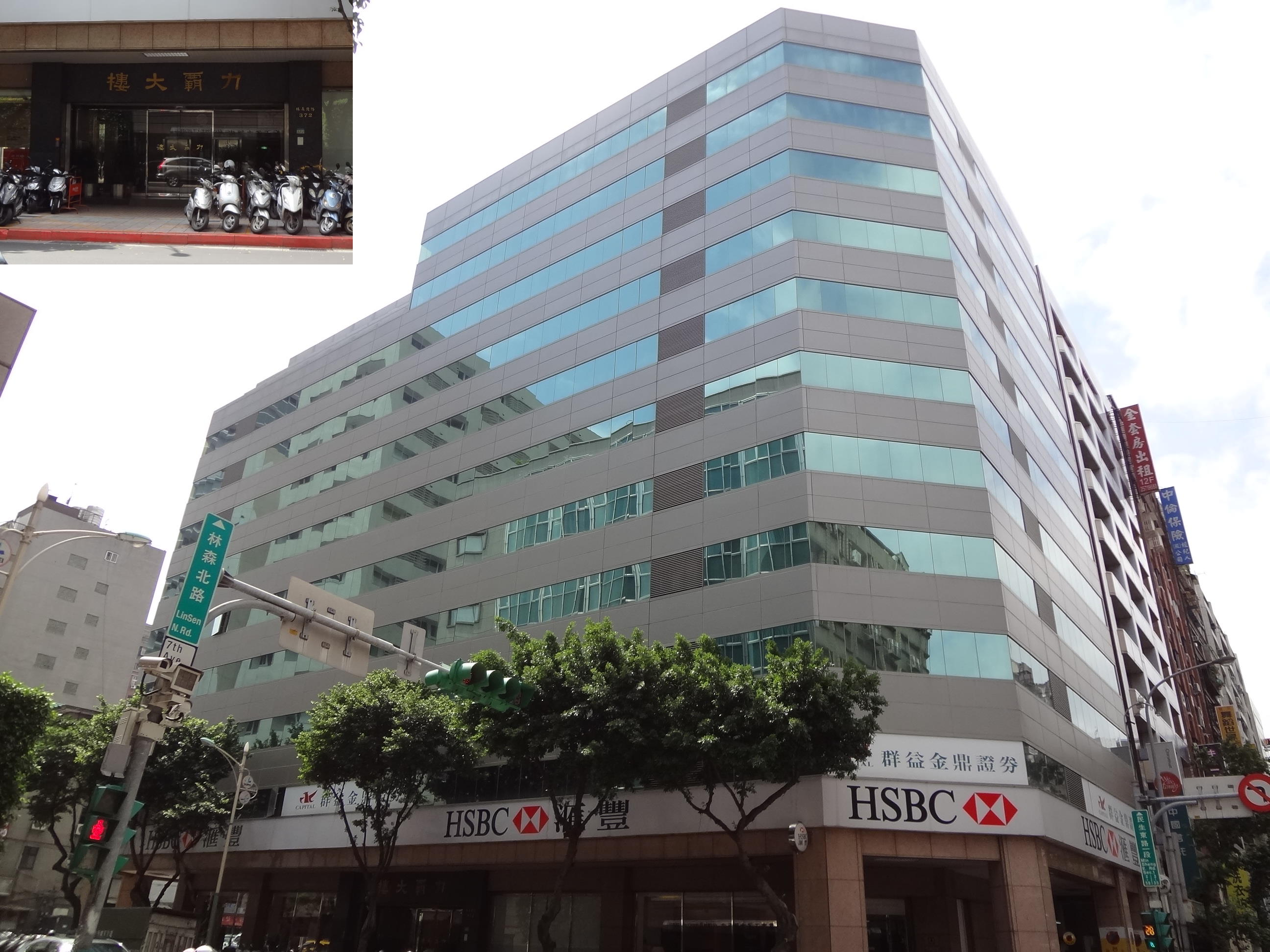 中文（台灣）: 力霸大樓，位於臺北市中山區林森北路372號。